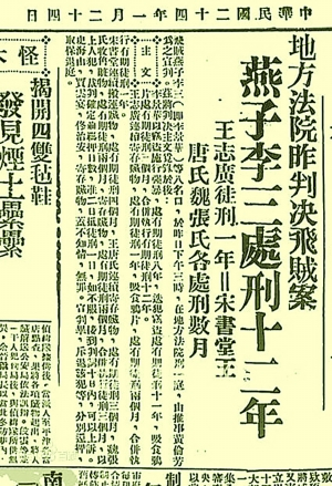 1935年1月24日《京报》报道的燕子李三被捕的消息